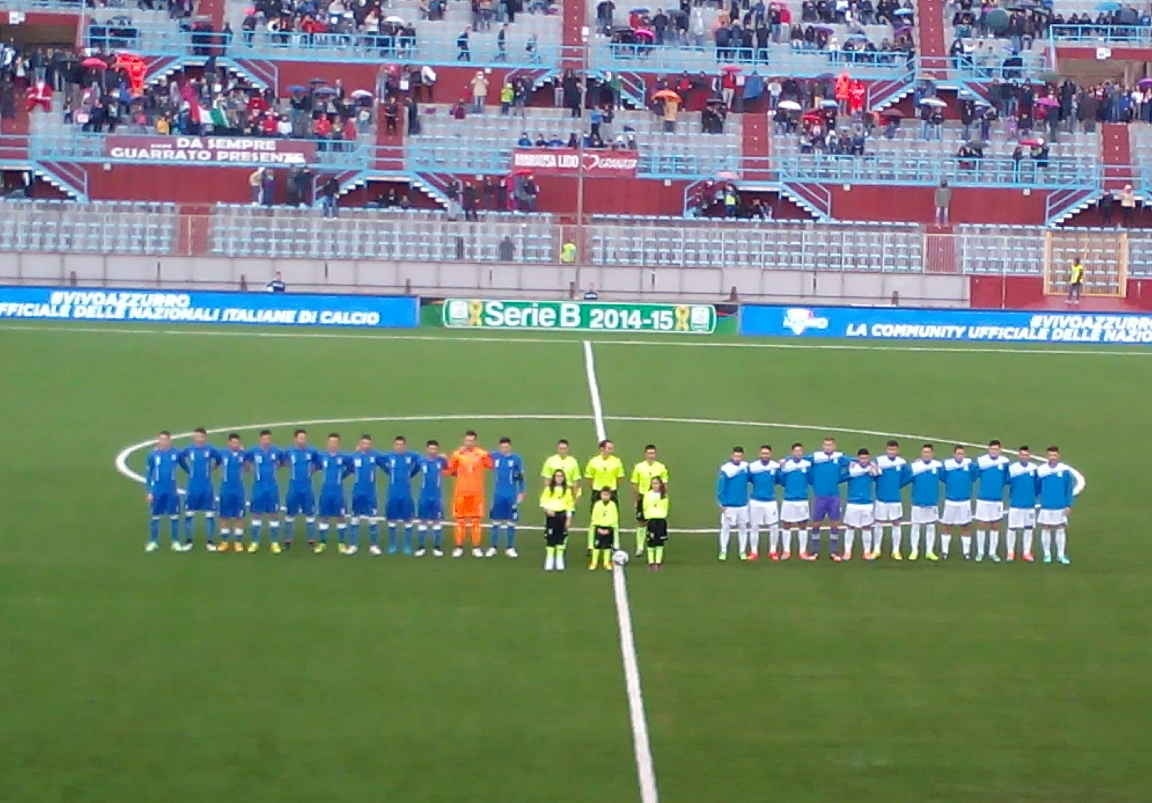 Gara tra Italia Under 21 e Italia "B" allo stadio provinciale di Trapani